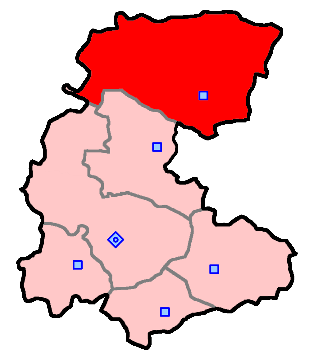 حوزهٔ انتخاباتی ساوه و زرندیه برای انتخابات مجلس شورای اسلامی